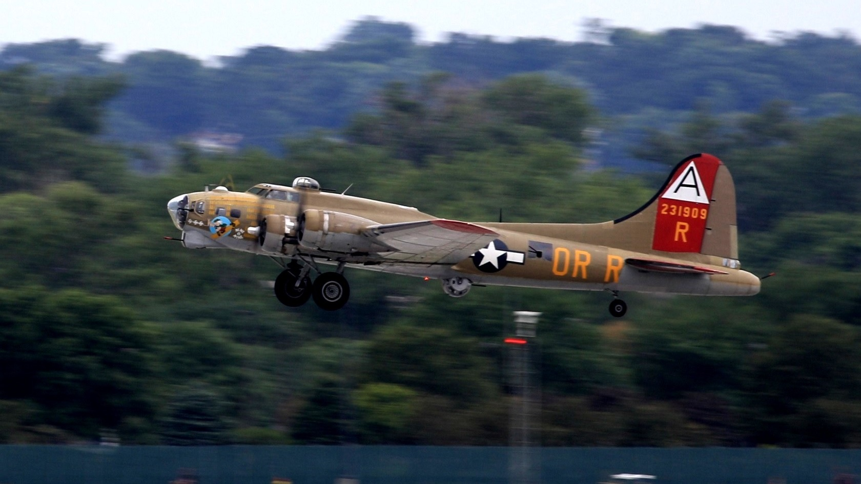 Boeing B-17G / Collings Foundation / Eppley Air Field(OMA) / 2015年7月19日